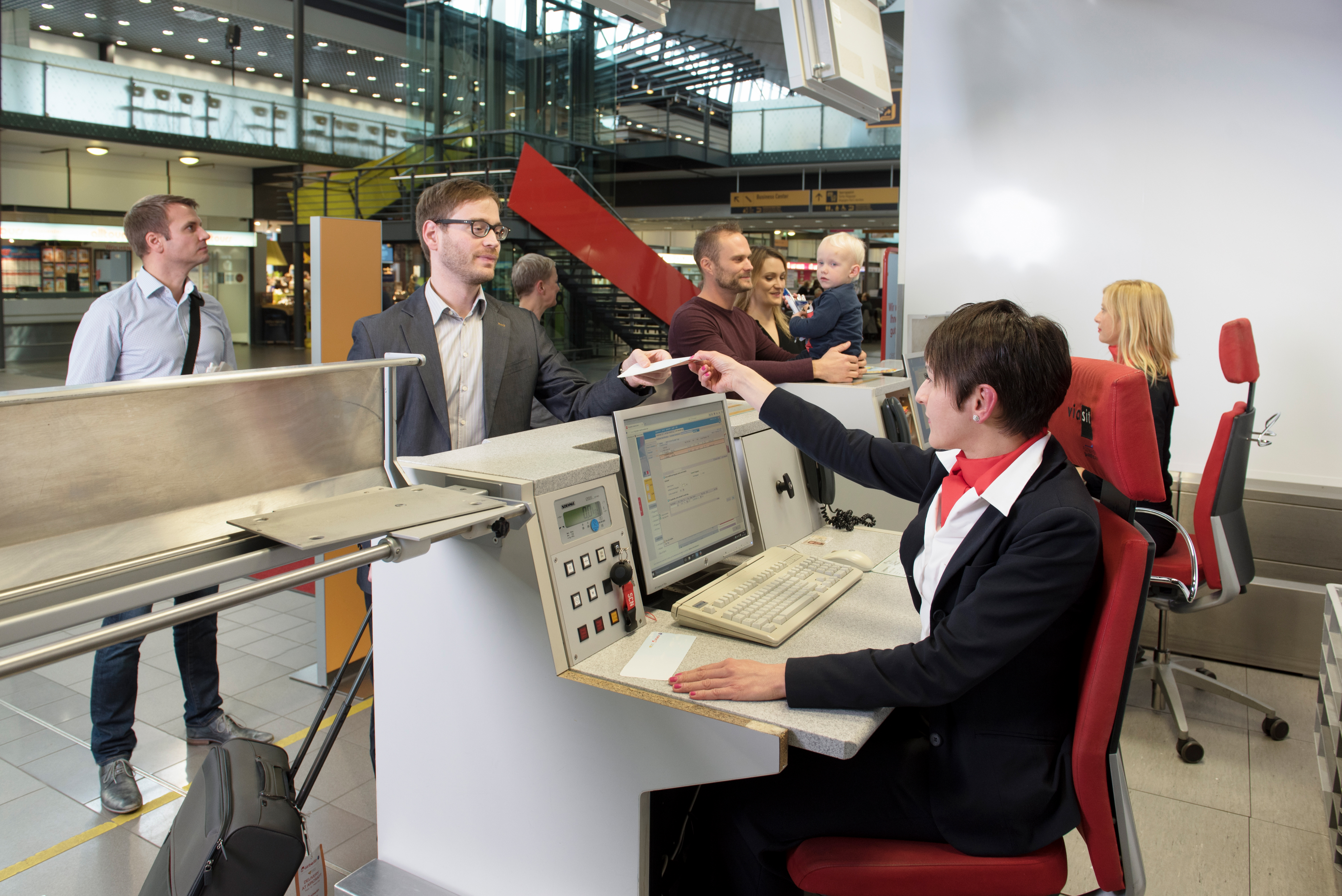 Check-In im Terminal des Flughafens Saarbrücken